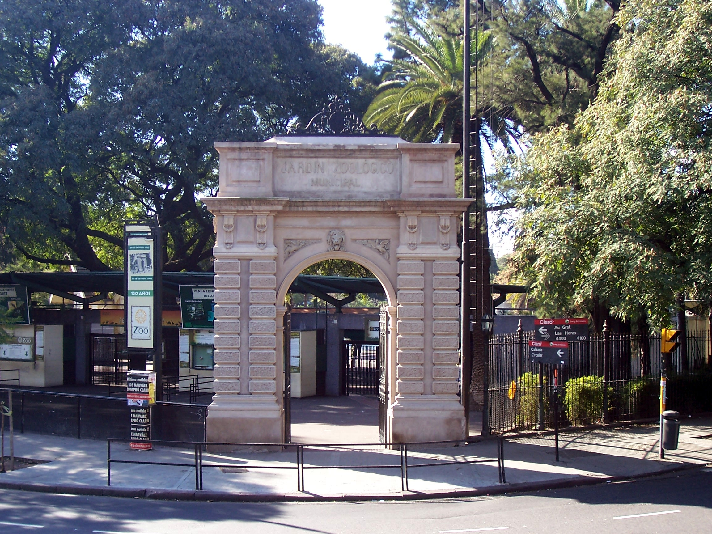 Jardín Zoológico